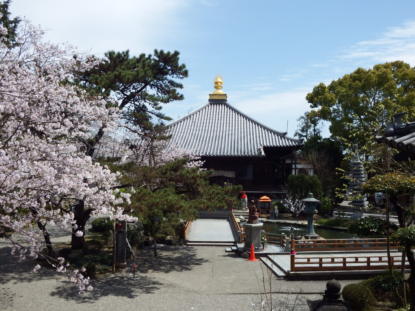 霊山寺の大師堂